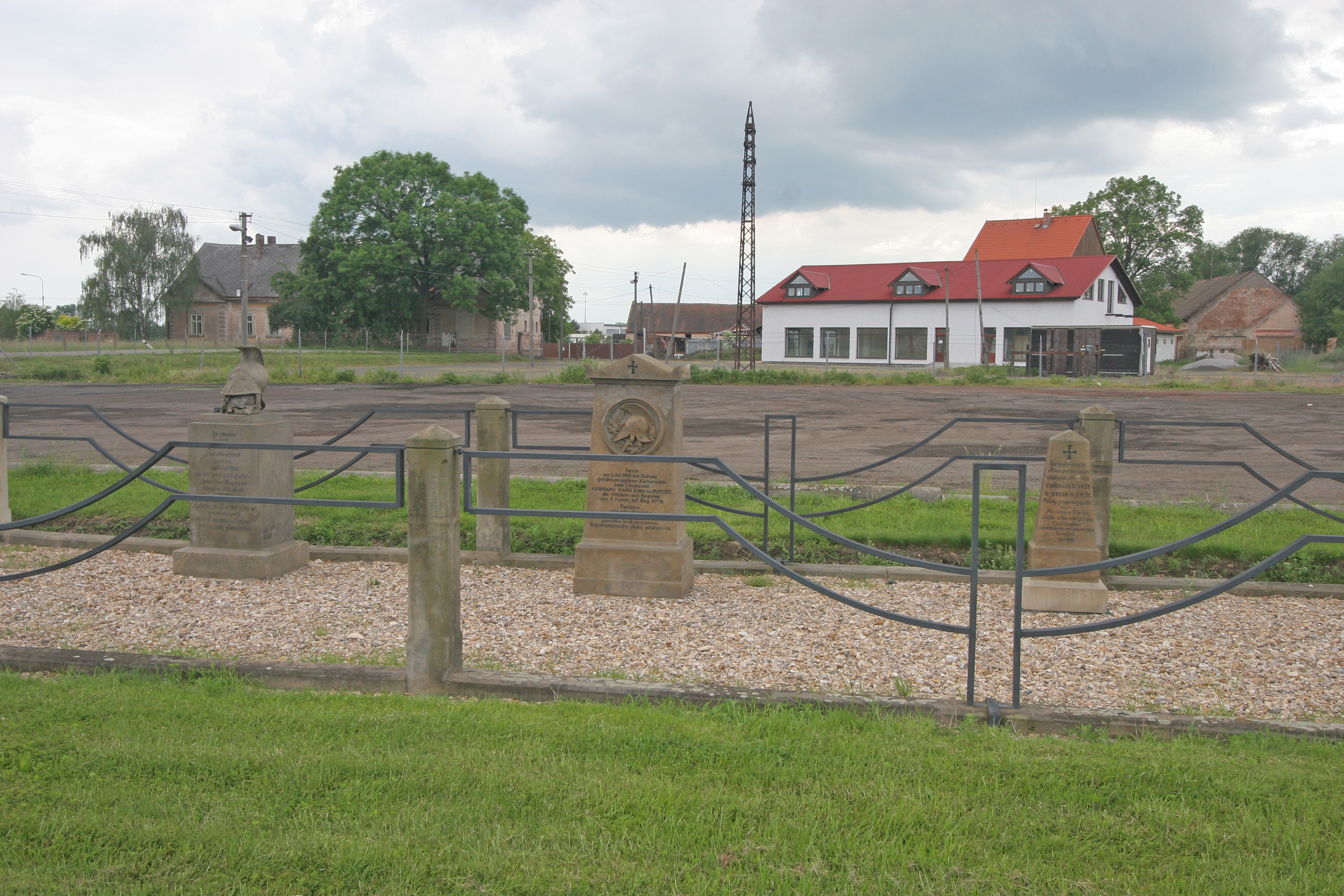 Sadová pomníky z války 1866